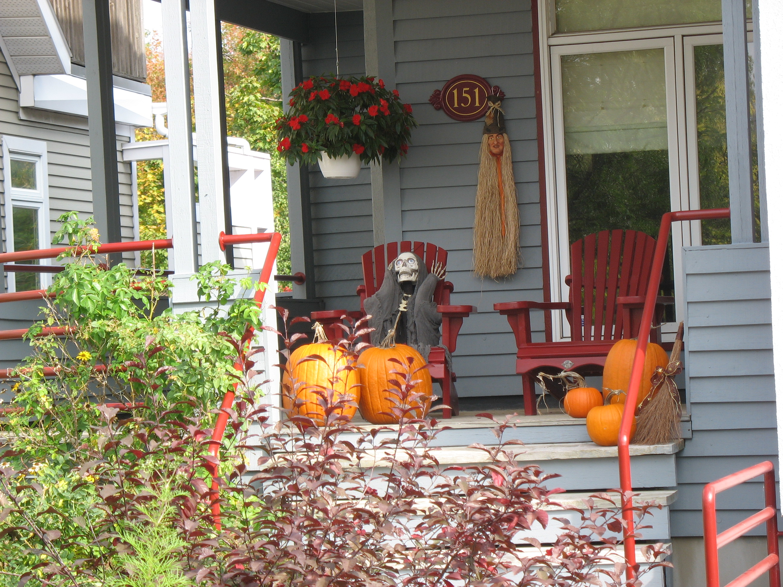 Дом, украшенный на Хэллоуин. Британия-роуд, район Британия, Оттава. 10 октября 2011.